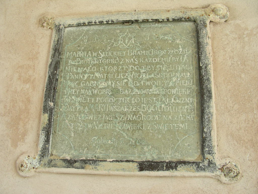 Беларуская (тарашкевіца): Гарадзкая Слуцкая брама. г. Нясьвіж This is a photo of Belarusian heritage monument. Reference number: 611Г000476 ( WLM)